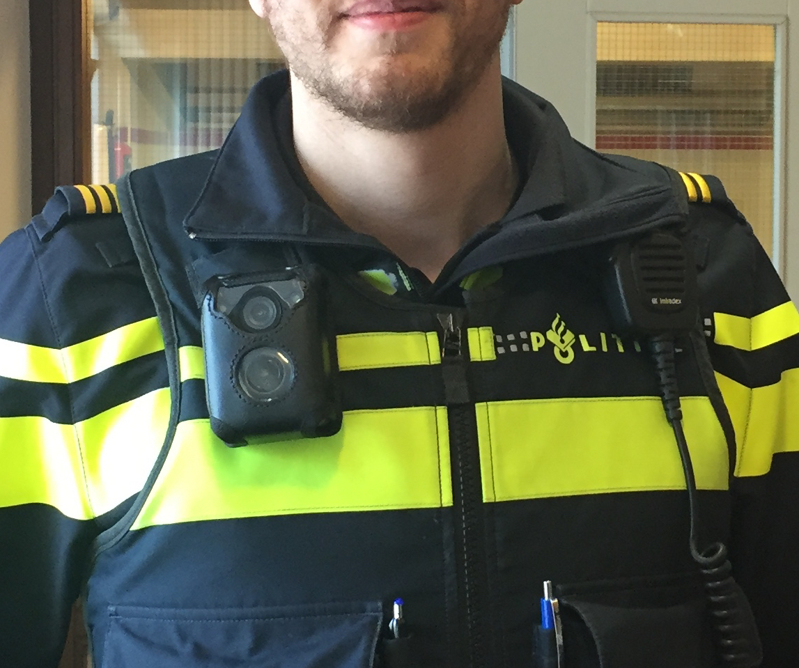 Bodycam van het merk Iwitness op het uniform van een agent van de Politie Eenheid Amsterdam genomen in 2018 op het bureau Diemen/Ouder Amstel